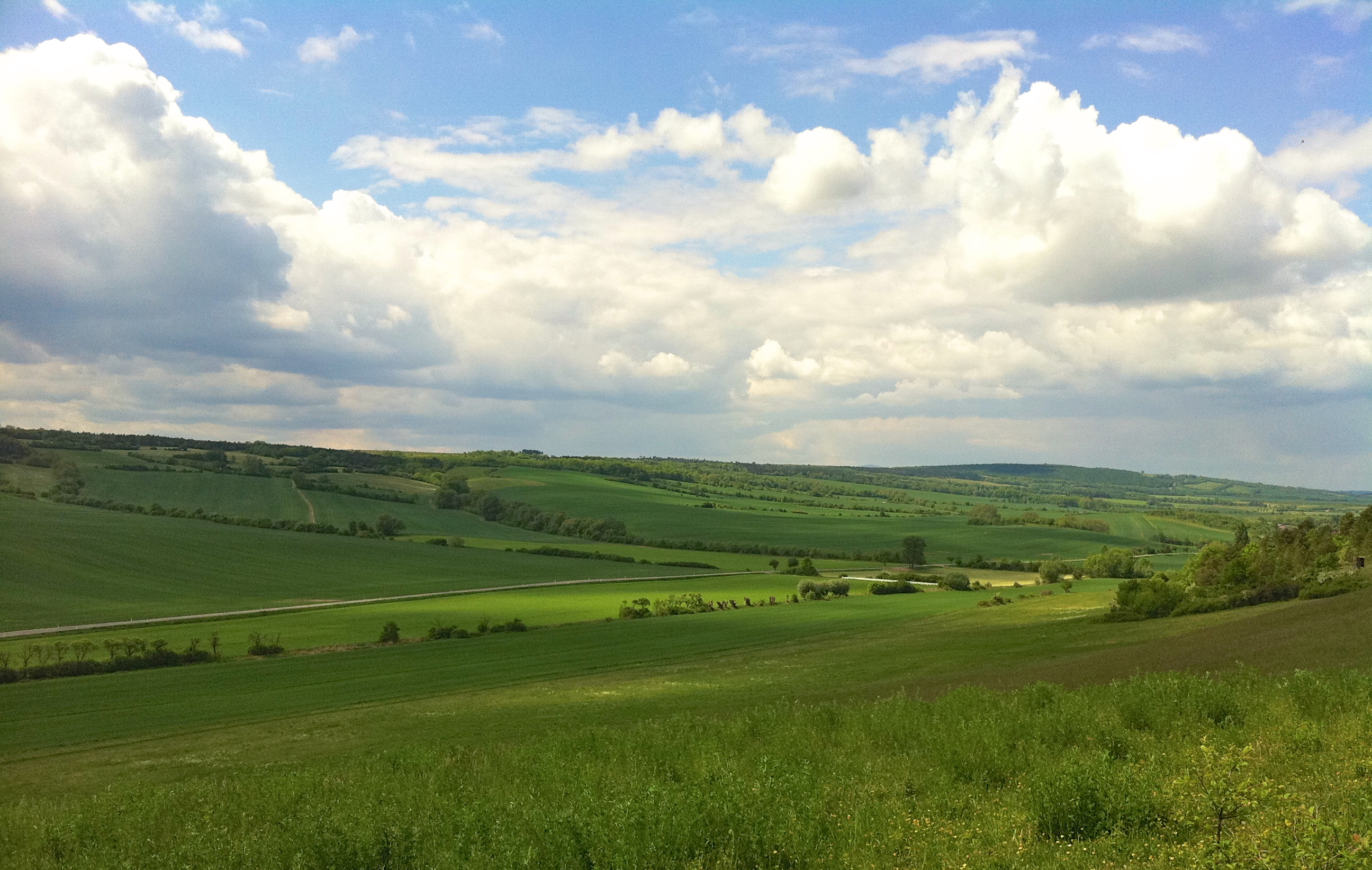 Auf dem Wanderweg der Drei-Burgen-Wanderung: etwa 20 Minuten von der Mühlburg in Richtung der Wachsenburg ist dieser Aussichtspunkt gegeben, der nach dem Schriftsteller August Trinius benannt ist. – Vordergrund bis zur Straße im Landschaftsschutzgebiet „Drei Gleichen“.